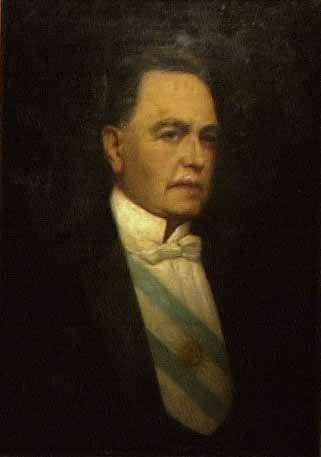 Foto oficial de Hipólito Yrigoyen como presidente 1916, Argentina foto oficial